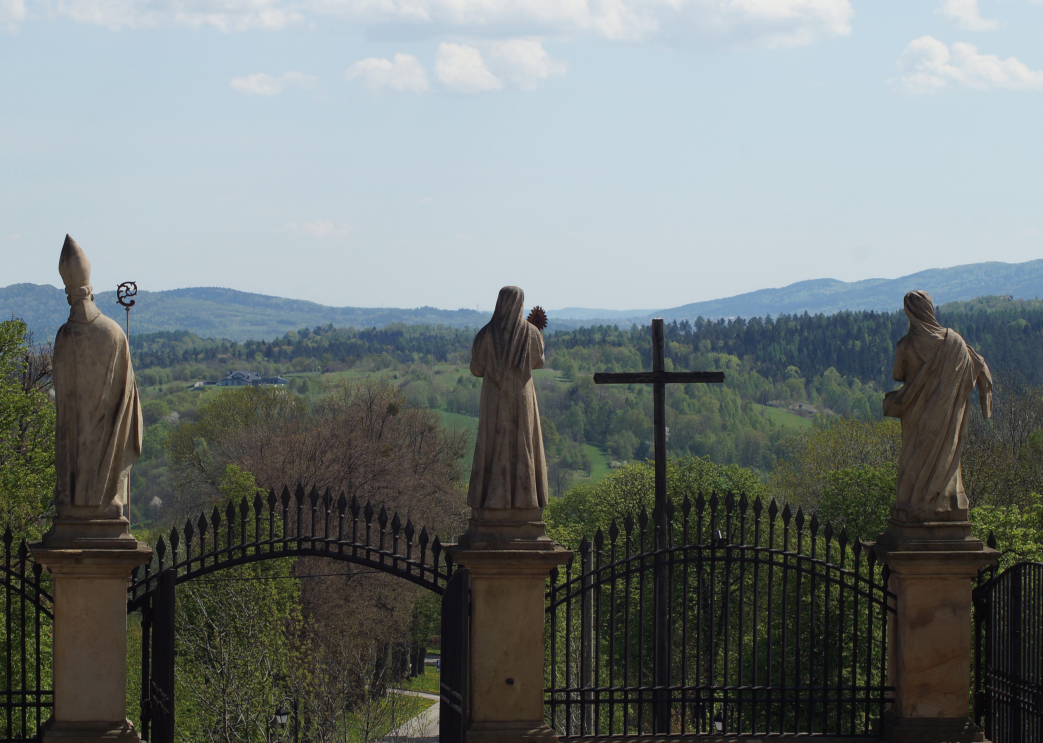 Wyjście